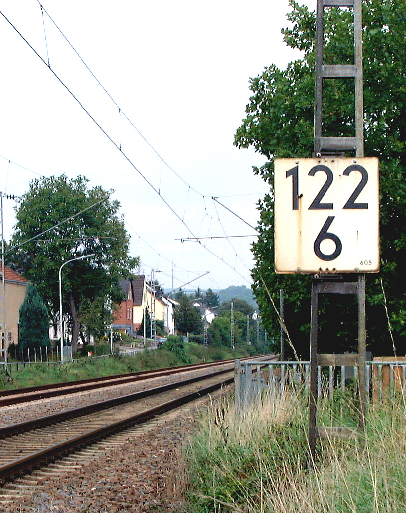 Abteilungszeichen am Oberleitungsmast